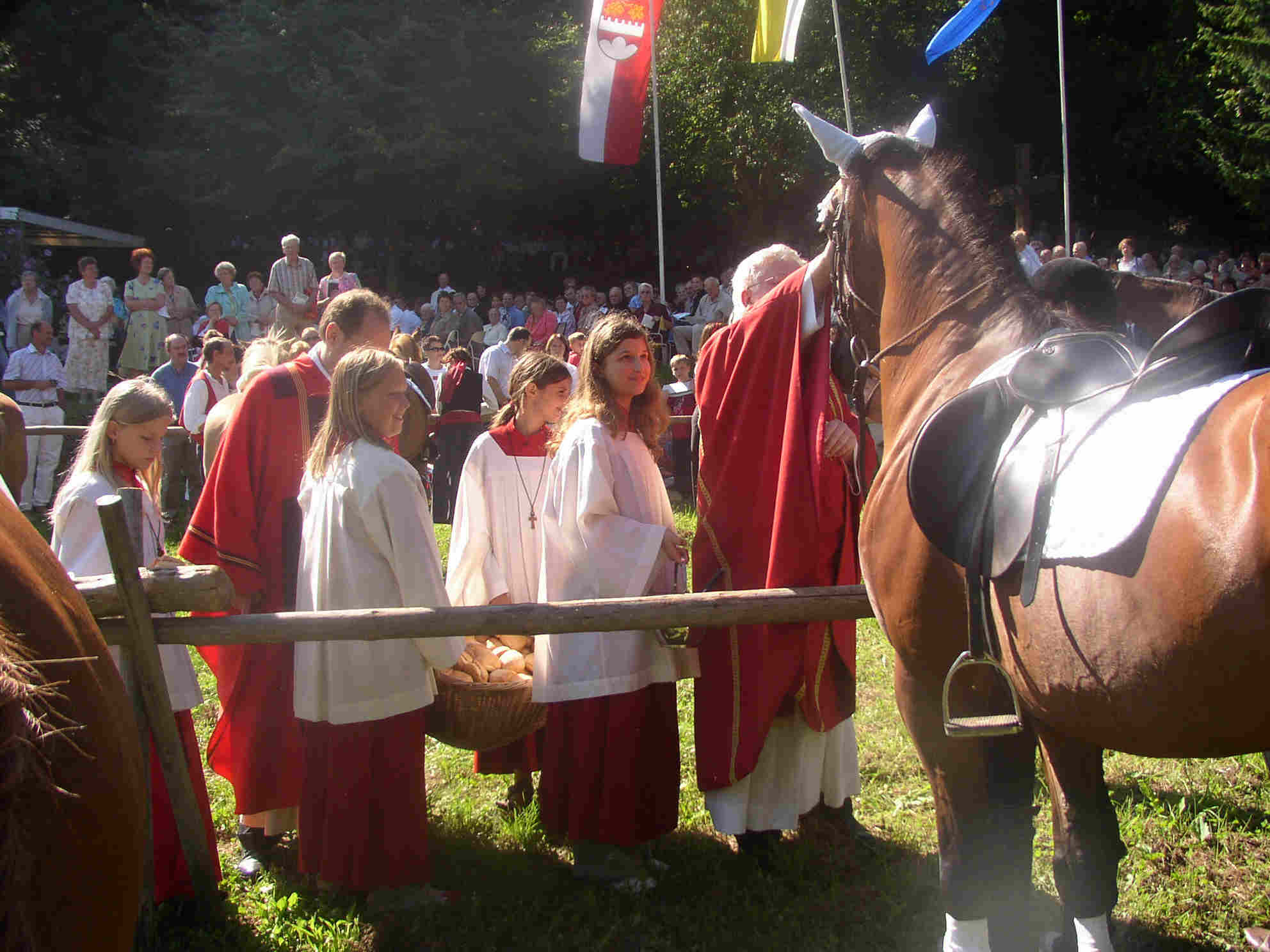 Foto vum dr Ross-Sägnung am Bandalionsfäscht 2005 z Rothwiil. Dr Fäscht-Brediger (Domkapitular Andreas Möhrle vu Friiburg) strichlet e Ross. S erscht Maidli (Minschtranti) drait dr Kessel mit em Gwicht-Wasser-Bänsel, diä andere dr Korb mit dr Weckli, wu jedes Ross ens drvu bikunnt. In Hintergrund e Deil vu däne mehrere hundert Glaibige, wu als zu däre Wallfahrt kumme.